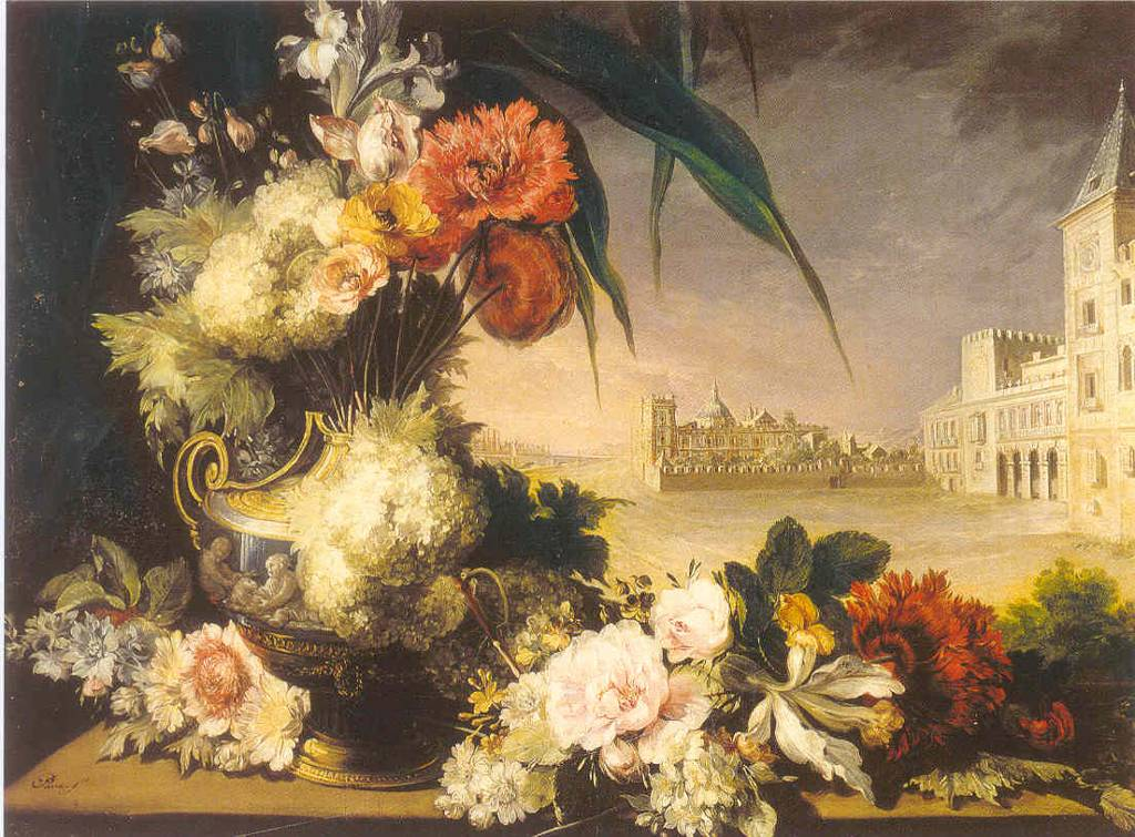 Quadre de Miquel Parra on apareix en un segon pla el Palau Reial de València (o del Real), pintat en 1819, pocs anys després del seu enderrocament.